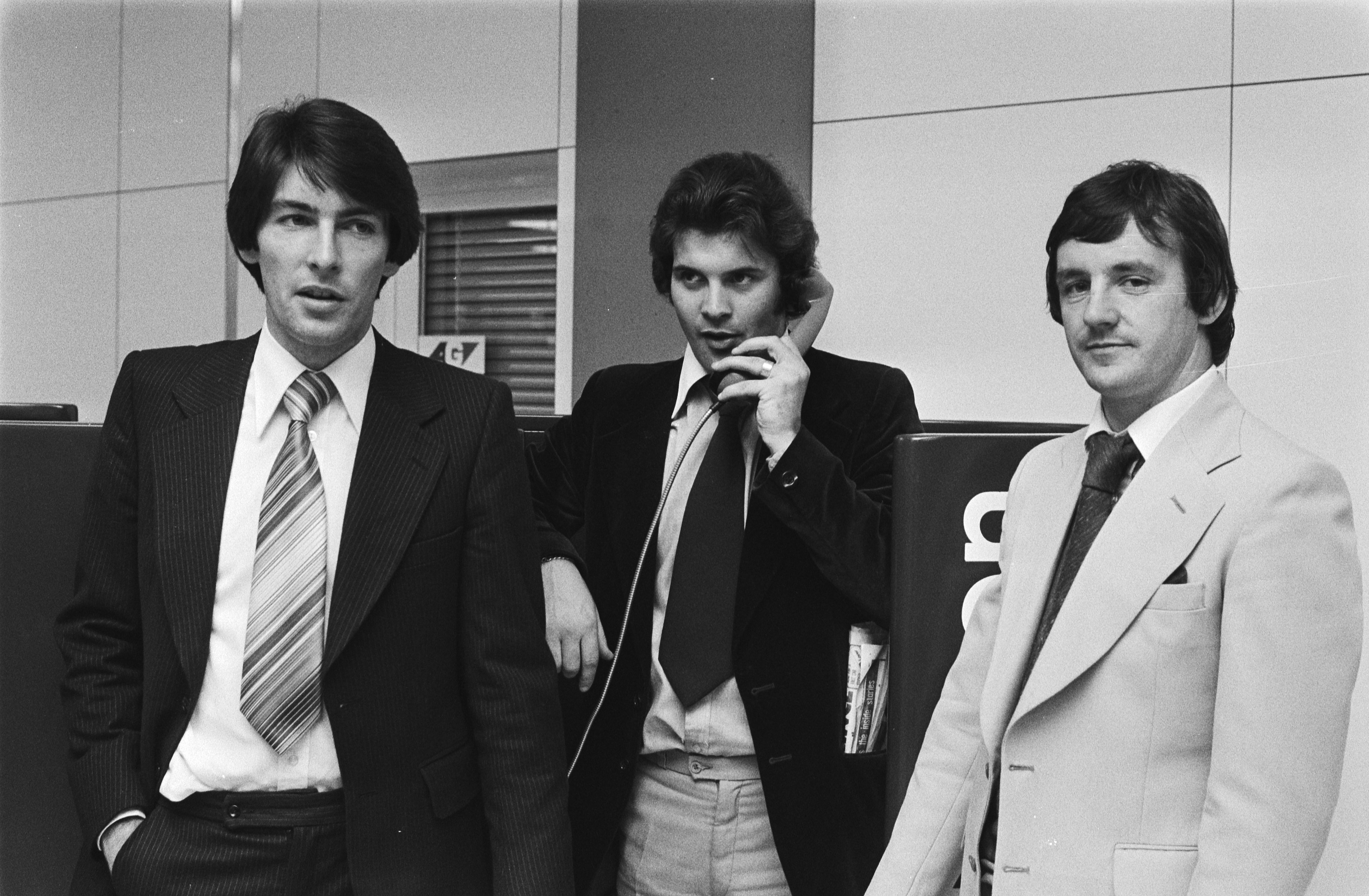 Collectie / Archief : Fotocollectie Anefo Reportage / Serie : [ onbekend ] Beschrijving : Aankomst Glasgow Rangers op Schiphol, tegenstander PSV; nr. 3 v.l.n.r. de spelers, Gordon Smith, Johnstone en Miller (kop) Datum : 30 oktober 1978 Locatie : Noord-Holland, Schiphol Trefwoorden : sport, voetbal Persoonsnaam : Glasgow Rangers, Johnstone Instellingsnaam : PSV Fotograaf : Croes, Rob C. / Anefo Auteursrechthebbende : Nationaal Archief Materiaalsoort : Negatief (zwart/wit) Nummer archiefinventaris : bekijk toegang 2.24.01.05 Bestanddeelnummer : 929-9700